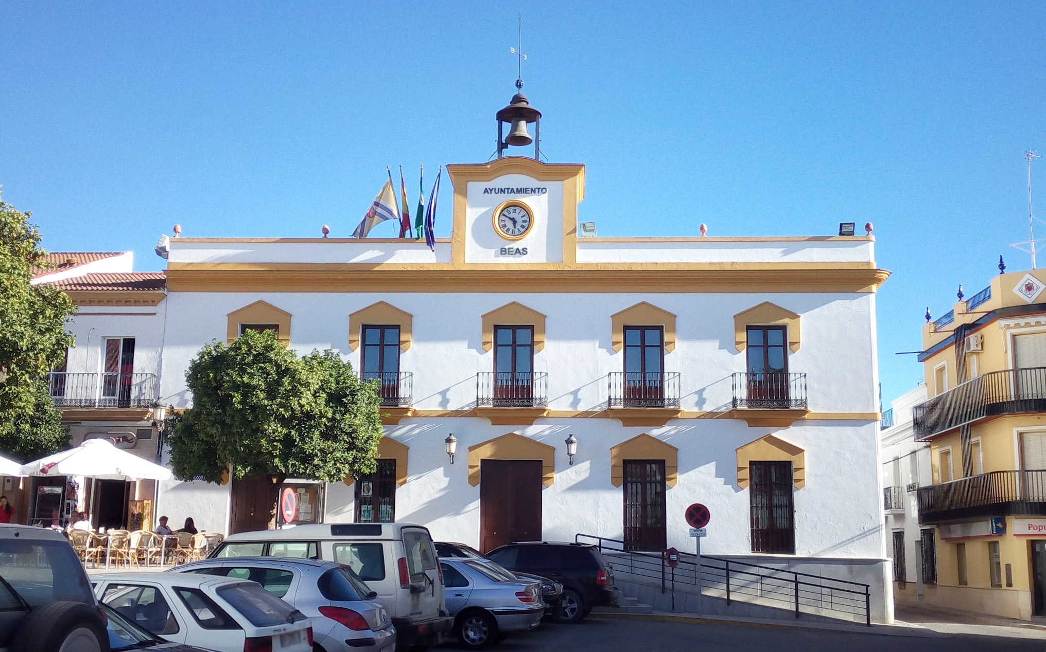 Frontal del ayuntamiento de Beas